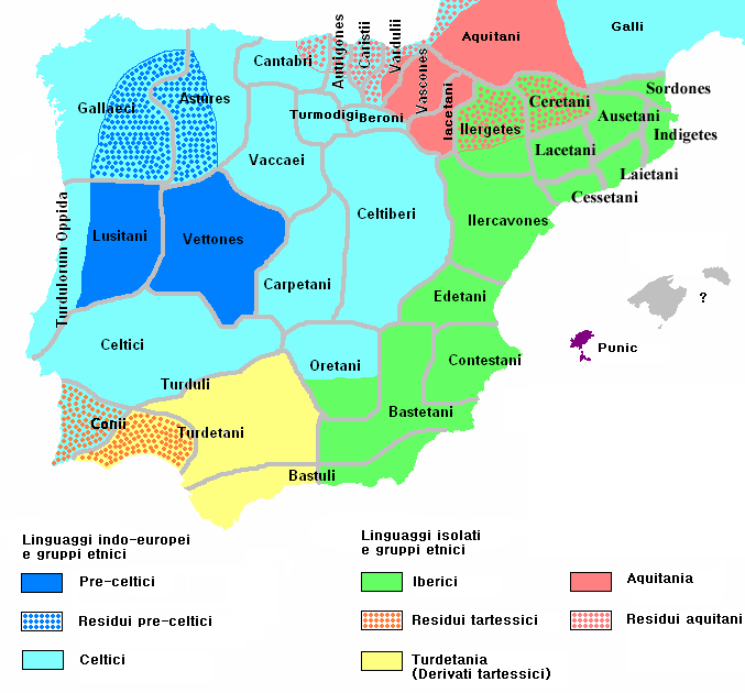 Versione italiana di File:Ethnographic Iberia 200 BCE.PNG